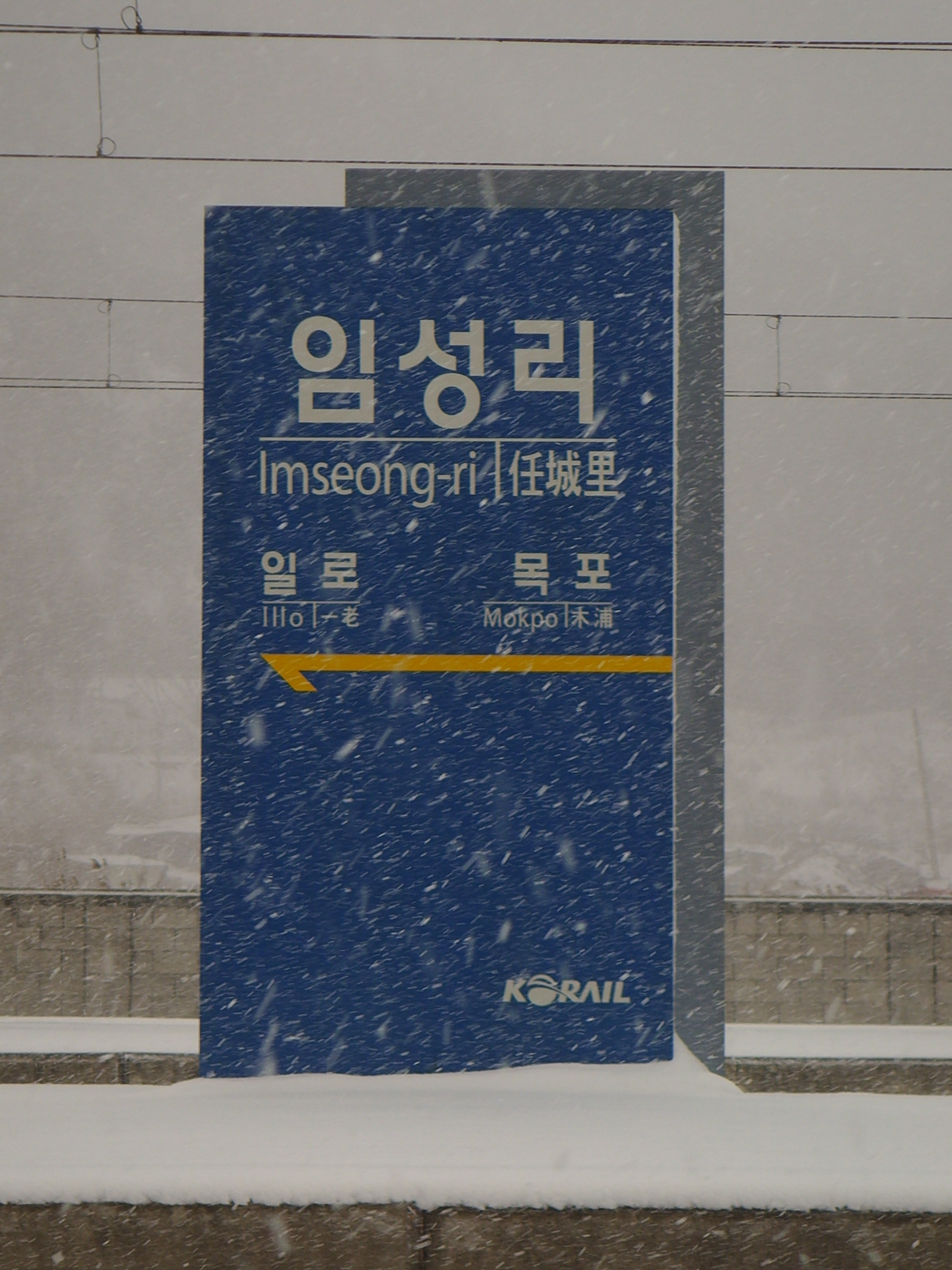 호남선 임성리역